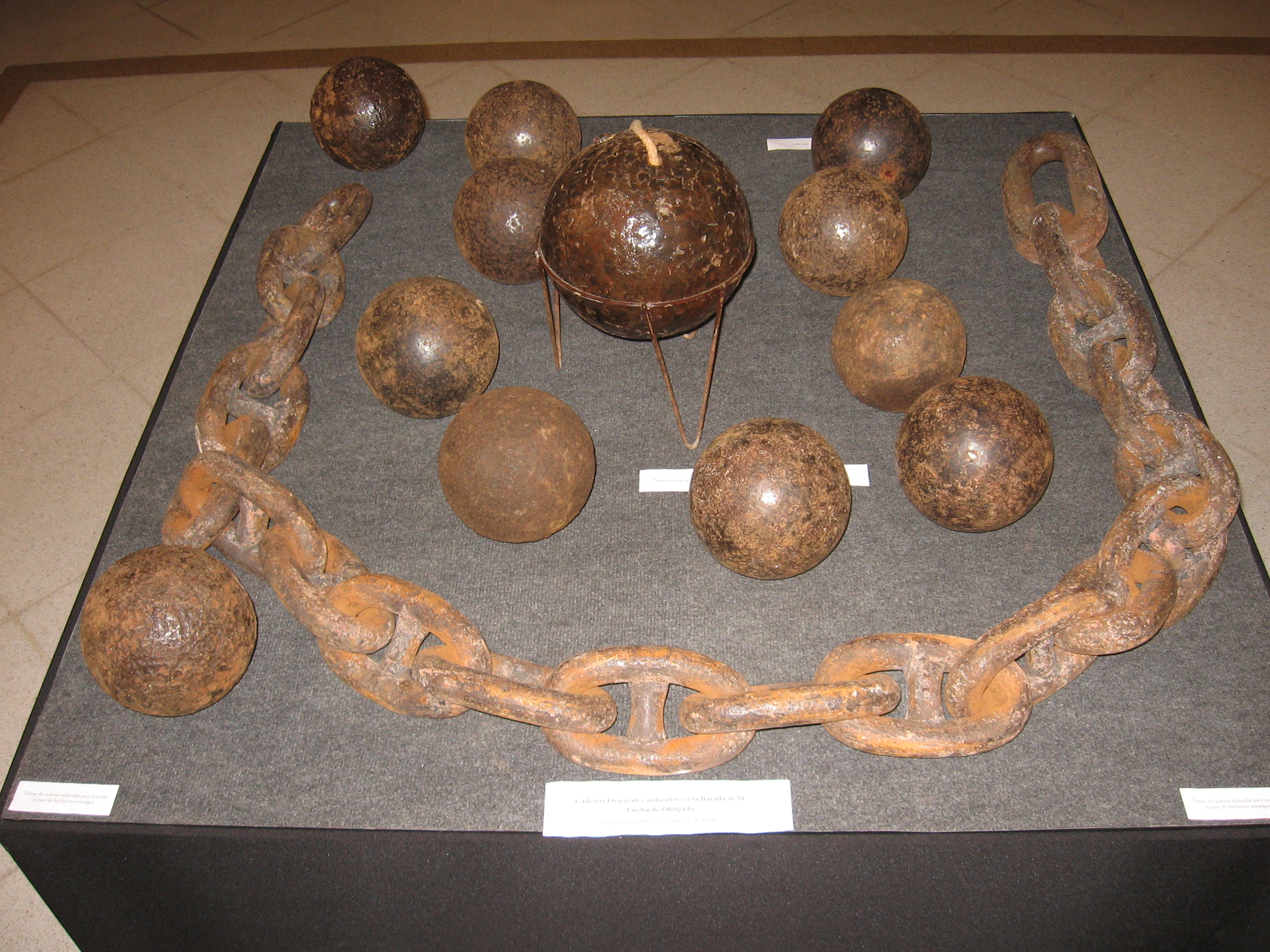 Trozos de las cadenas utilizadas en la batalla de Vuela de Obligado, expuestos en la Casa Rosada con motivo del Día de la Soberanía